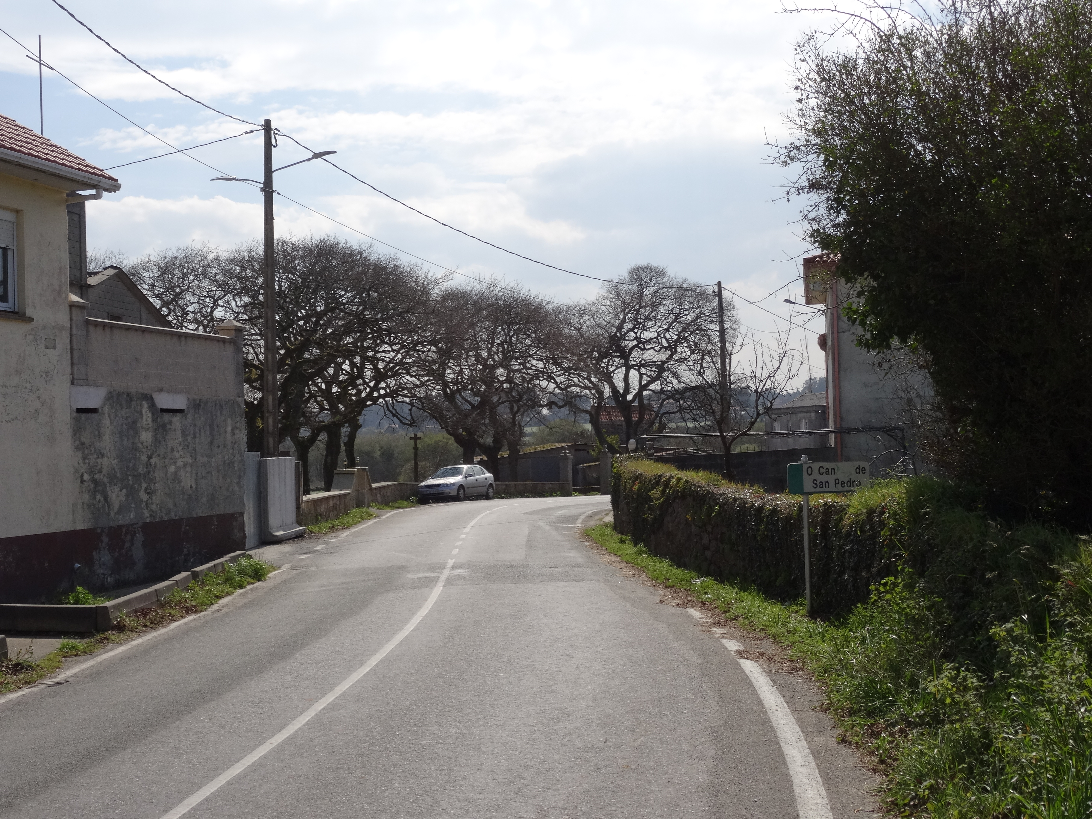 Lugar do Campo de San Pedro, parroquia de Cances, Carballo.